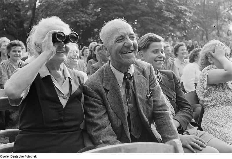 Original image description from the Deutsche Fotothek Zuschauer